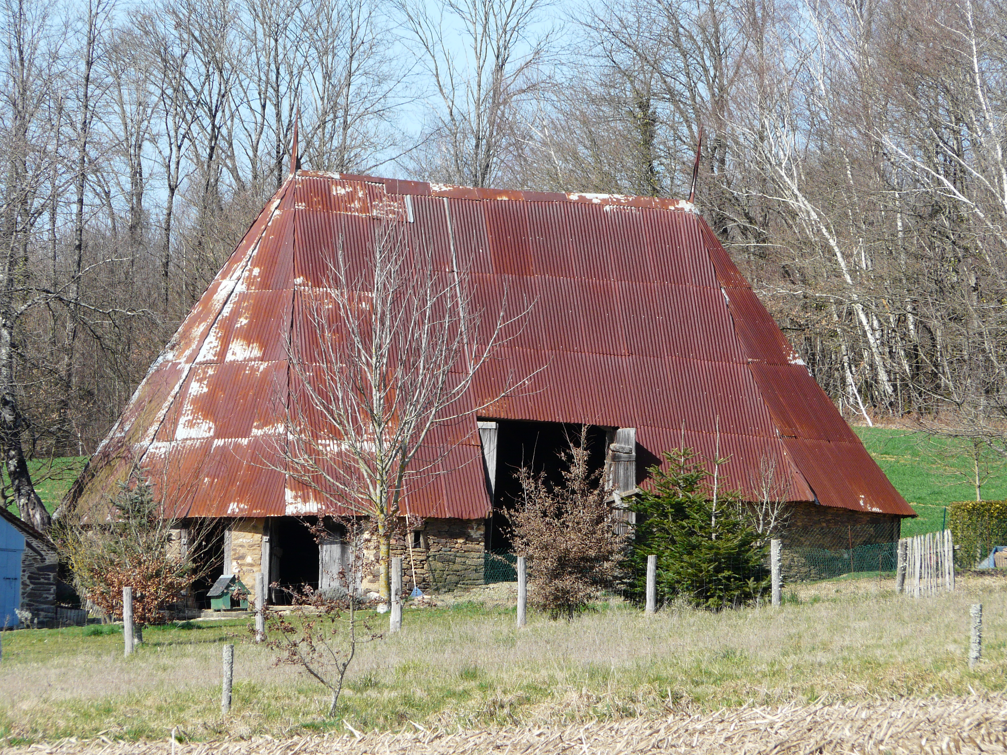 La grange ovale du Rouveix, Payzac, Dordogne, France.